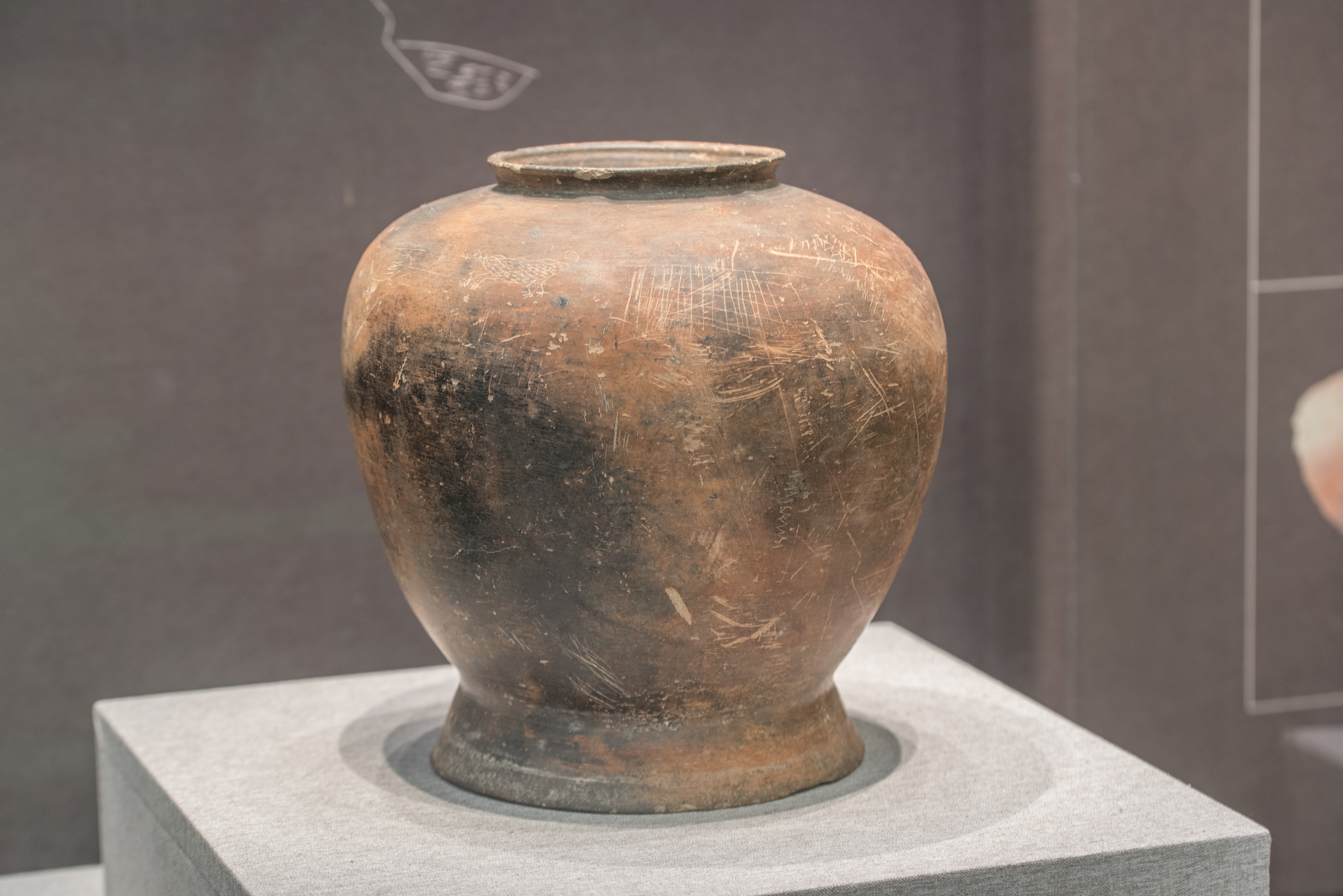 杭州良渚博物馆